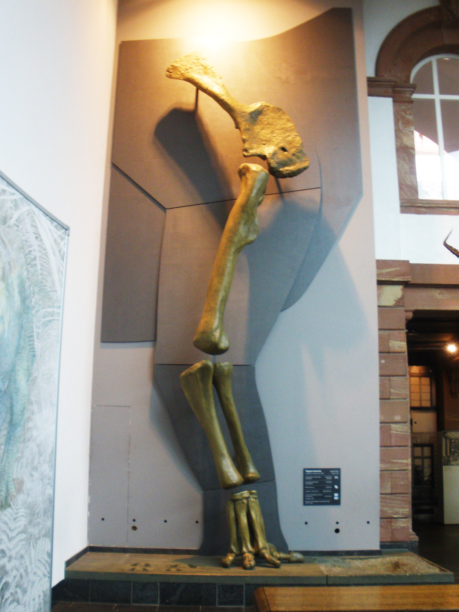 Fossil of Supersaurus, an extinct sauropod- Took the photo at Senckenberg Museum of Frankfurt